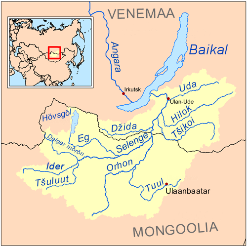 Selenge jõgi